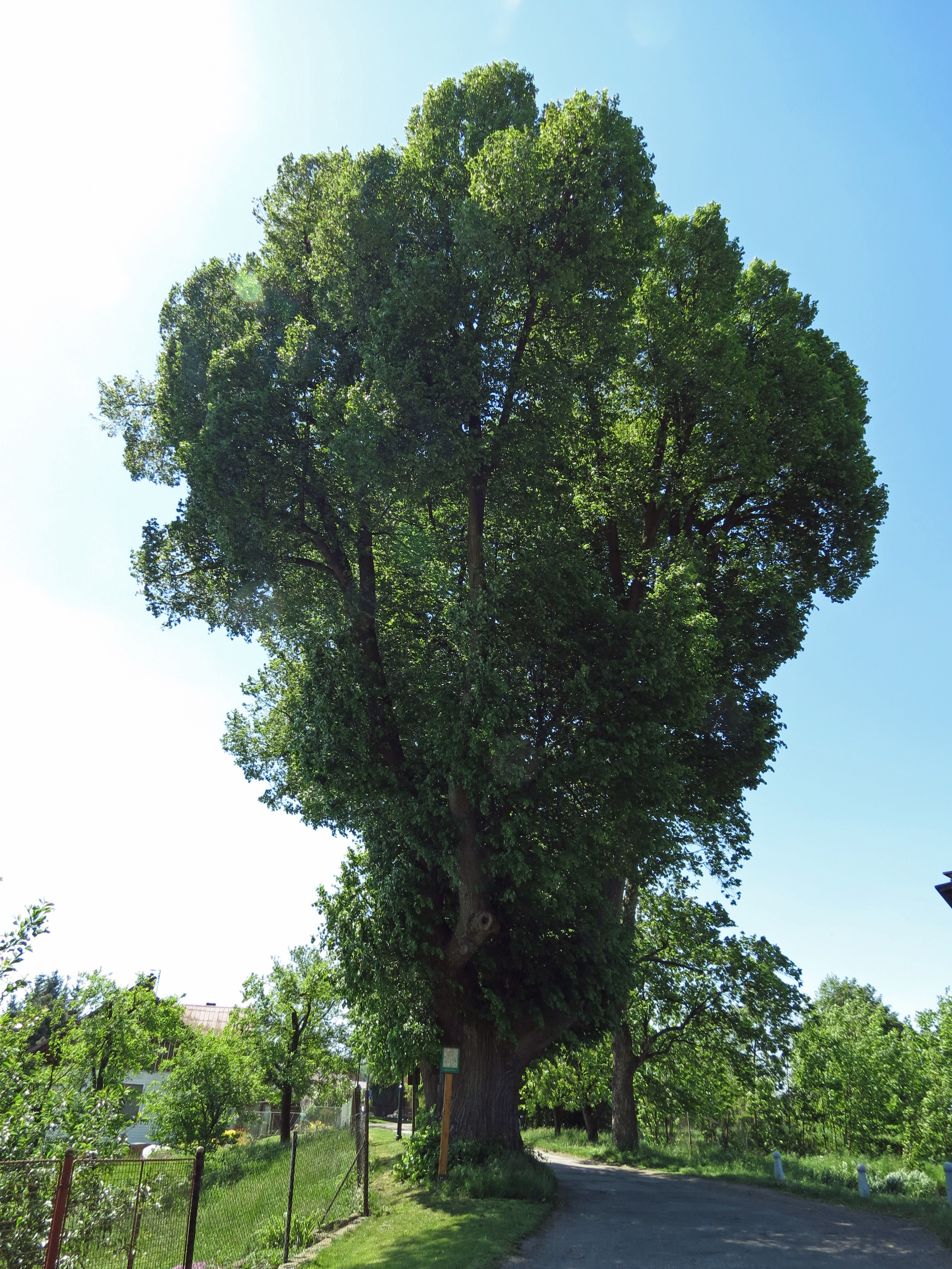 Lípa srdčitá v Hořiněvsi